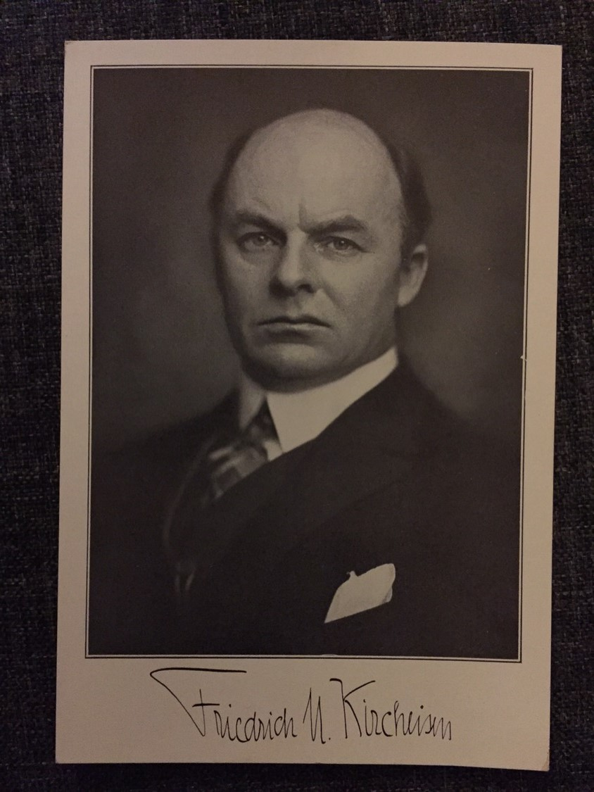 PK mit Portrait Friedrich Kircheisen